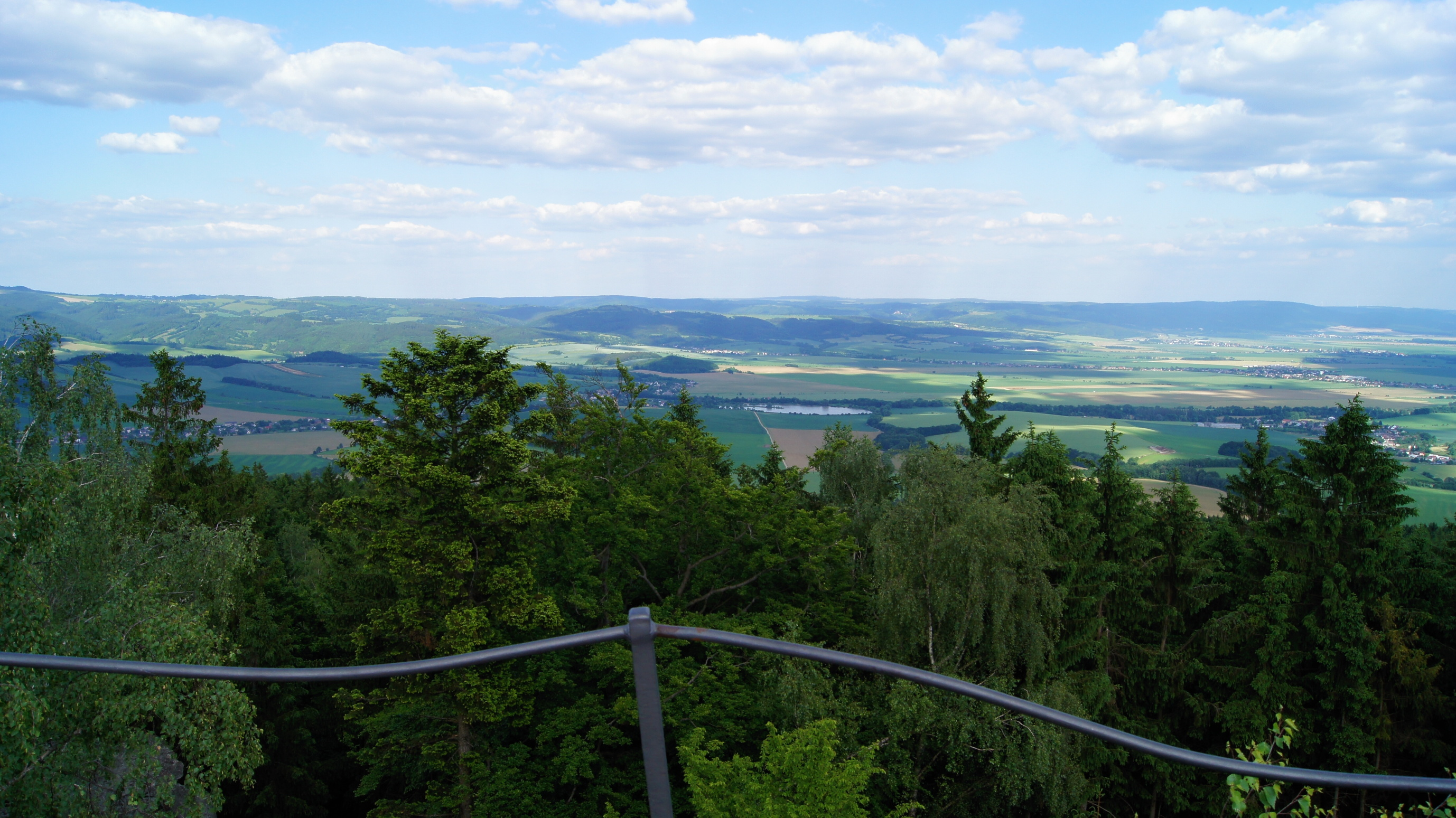 Bradlo